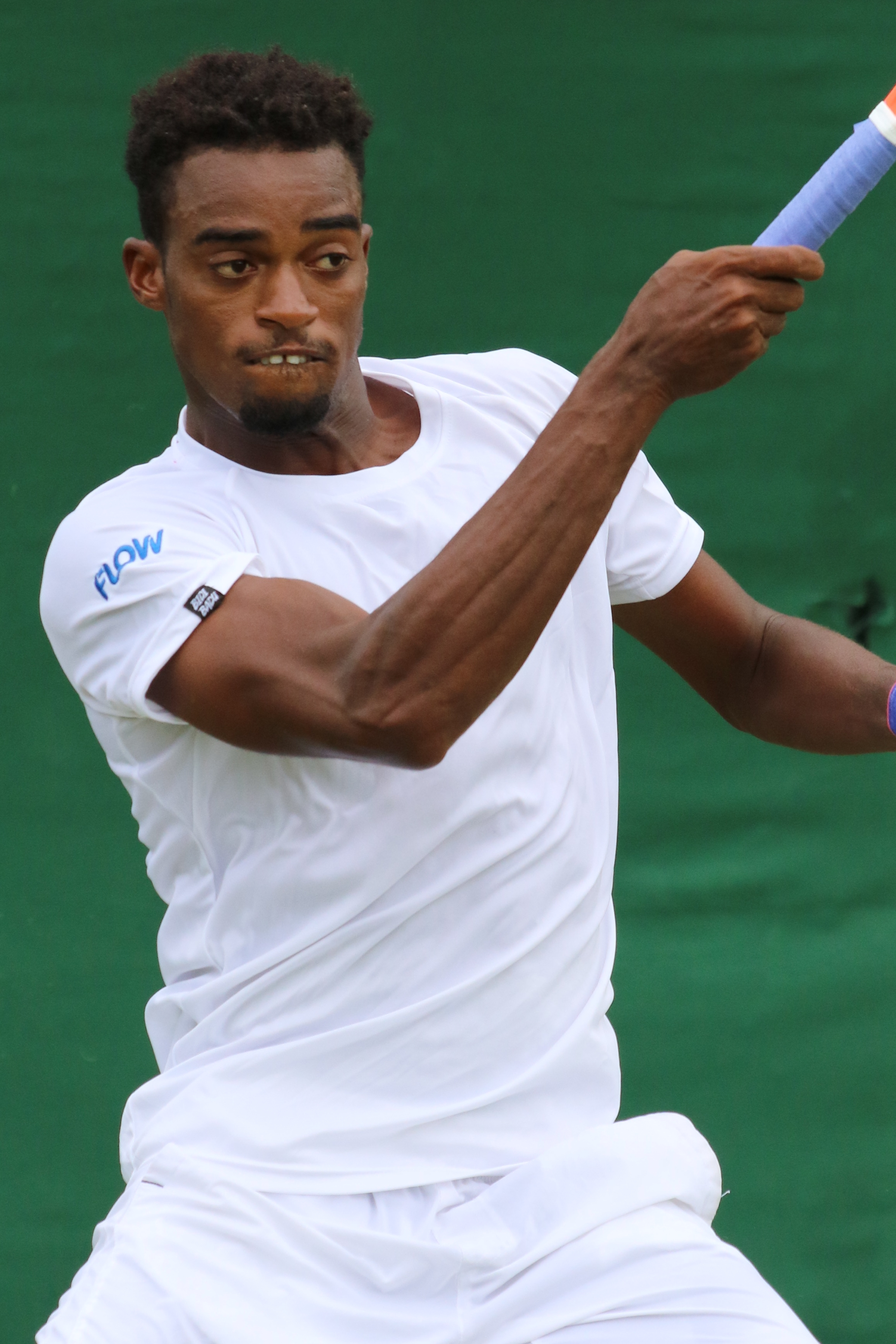 King D. WMQ16 (2)